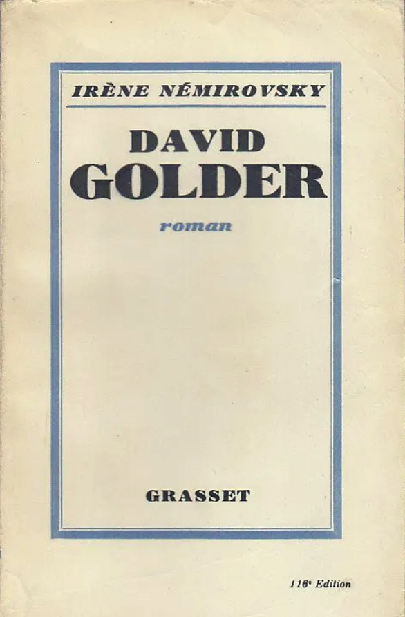 Couverture du roman David Golder d'Irène Némirovsky édité chez Bernard Grasset (116ème édition).